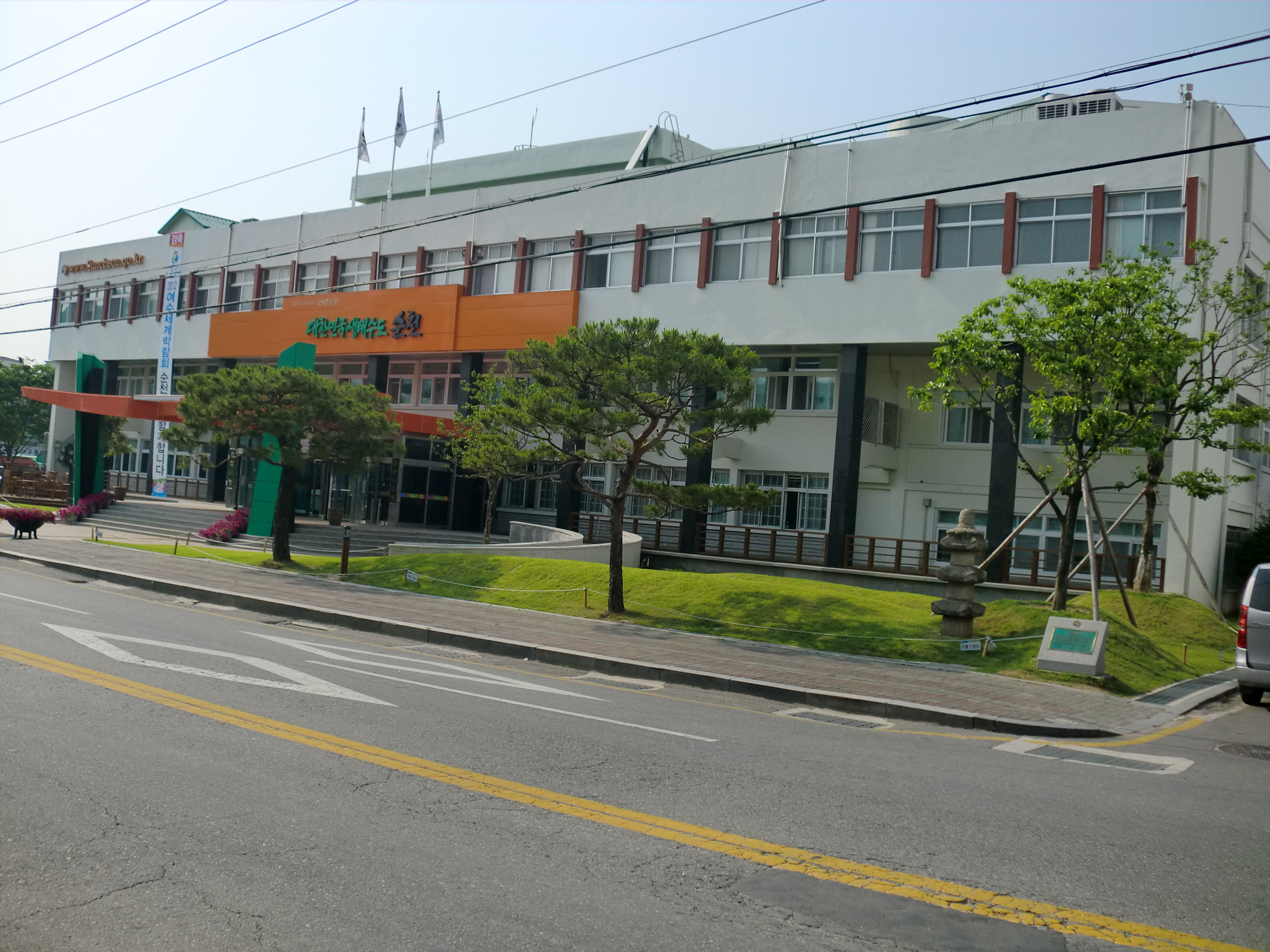 전라남도 순천시에 있는 순천시청